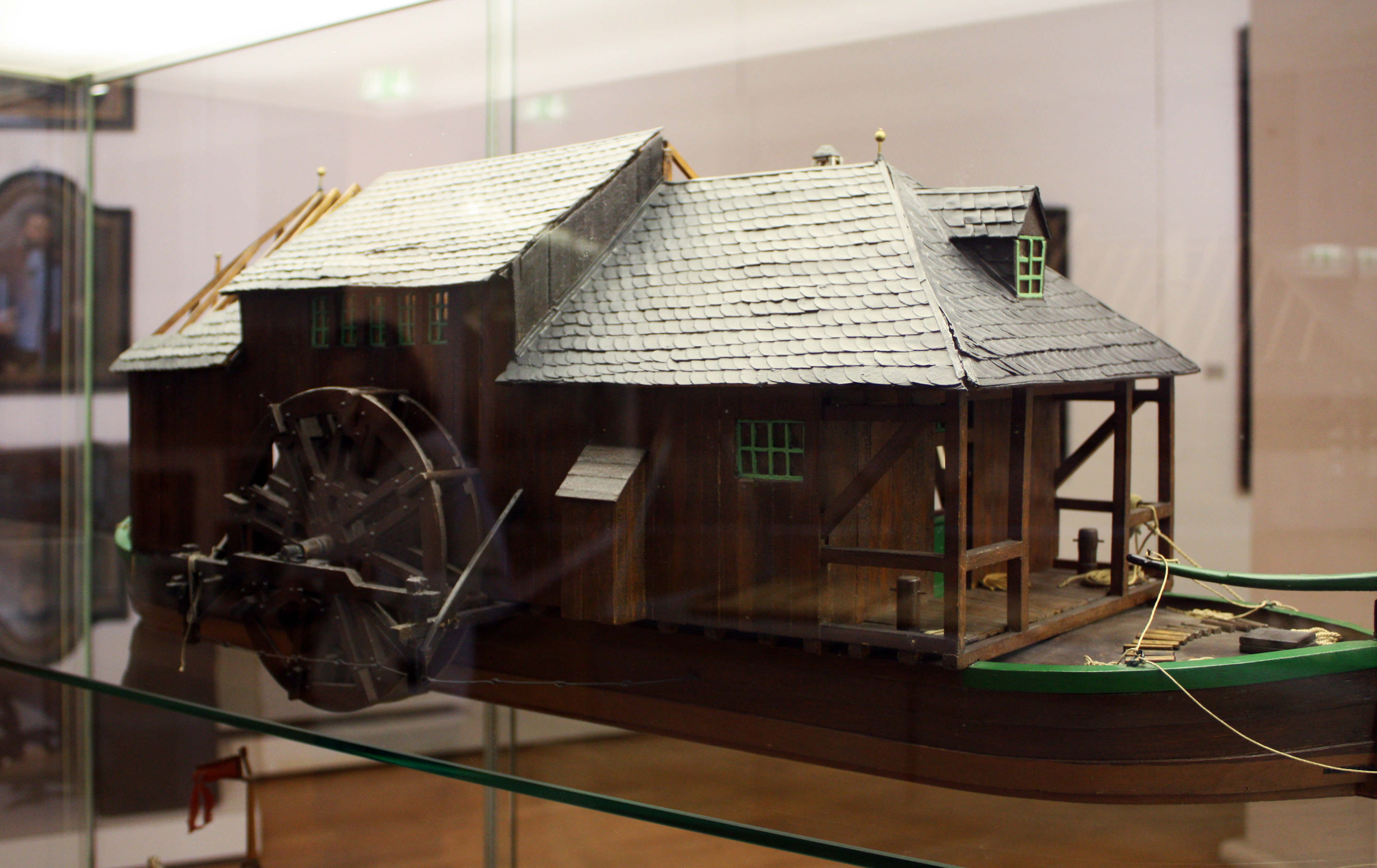 Modell einer Kölner Rheinmühle